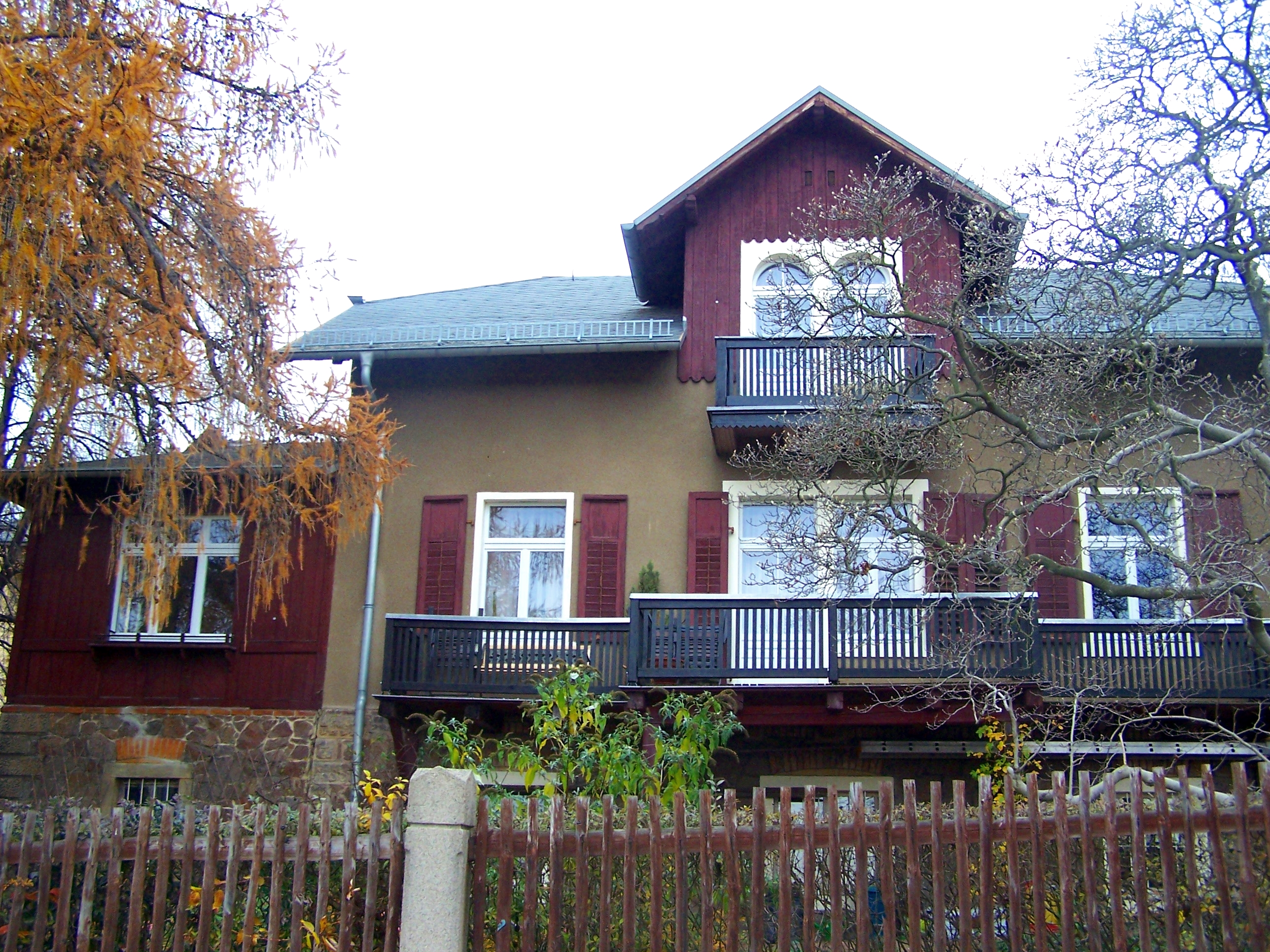 Landhaus August Radloff (Weinbergstr. 42) in Radebeul